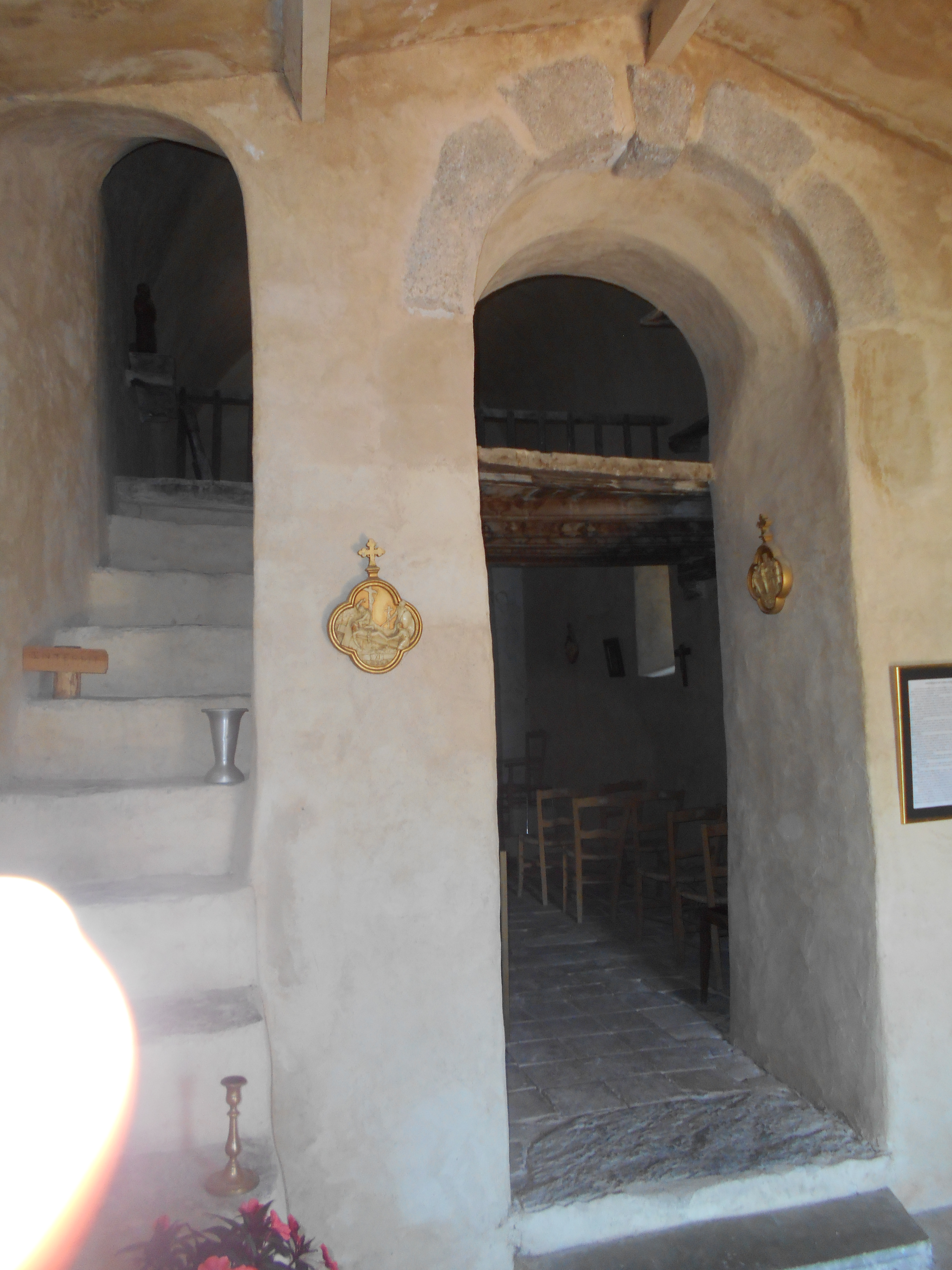 Interior de la Mare de Déu de la Roure